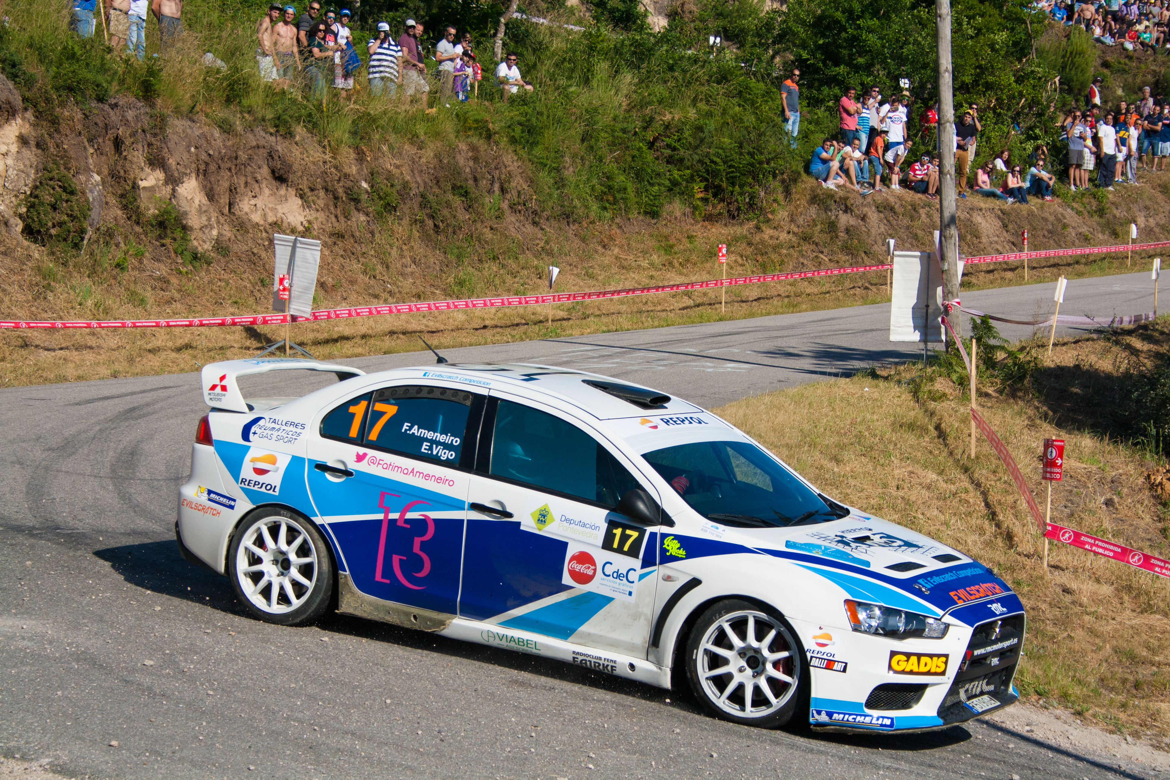 TC 2-4 (Nigrán)